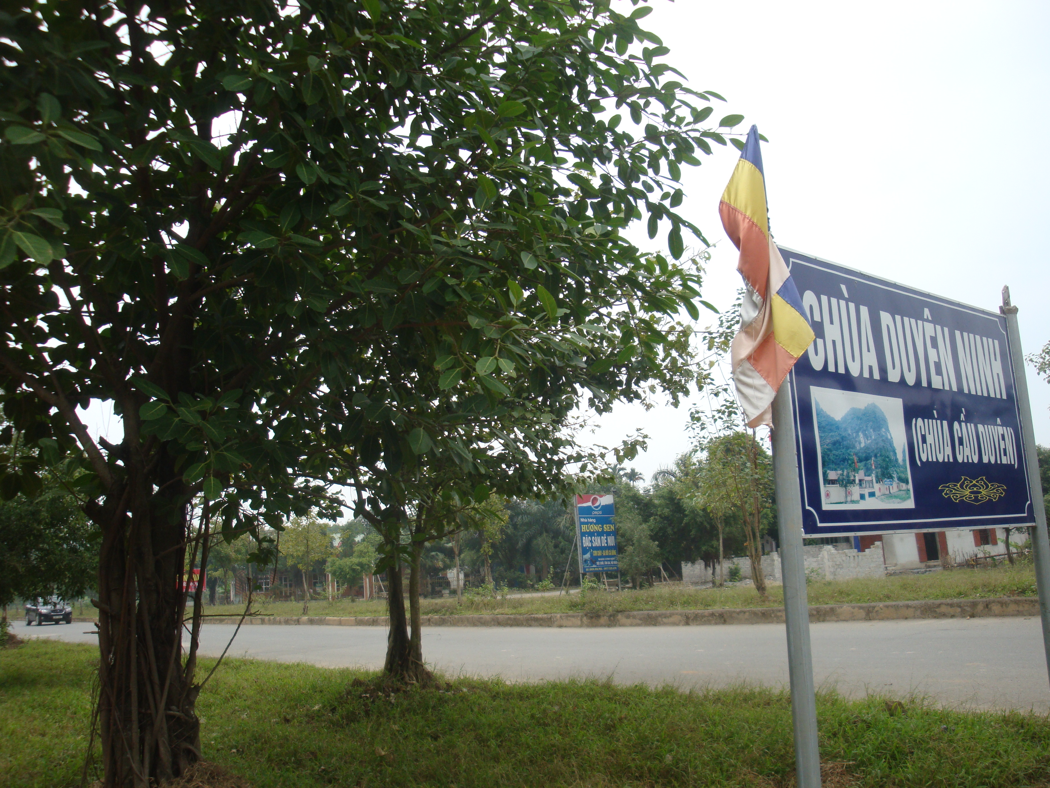 chùa Duyên Ninh bên đại lộ Tràng An